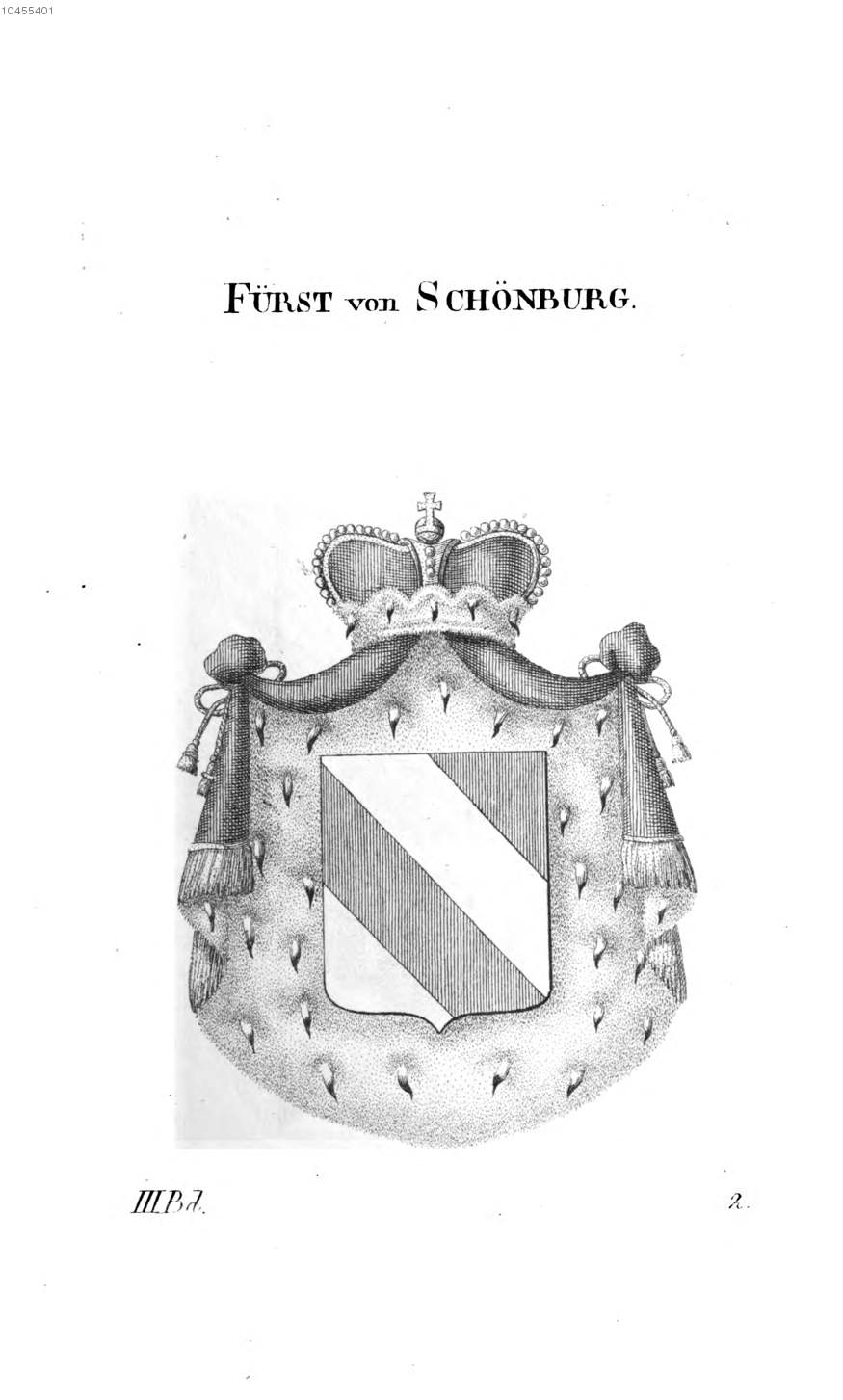 Wappen Schönburg - Tyroff AT.jpg